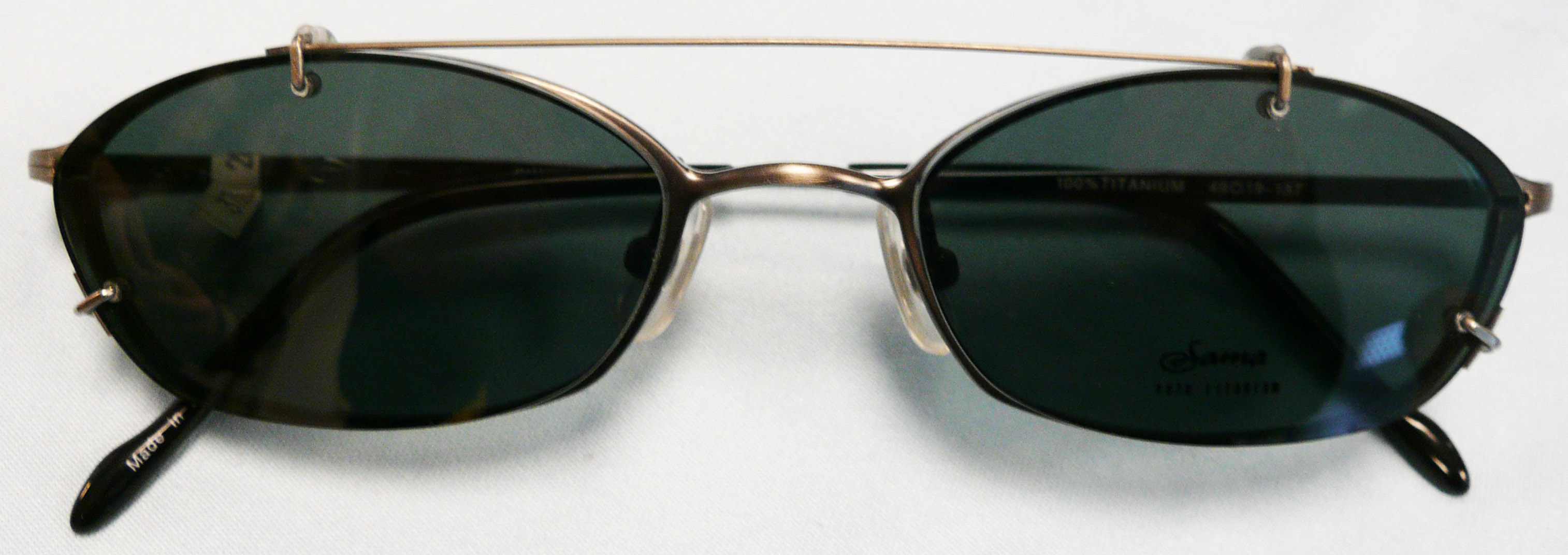 Der Sonnenclip wird auf eigene Brille (mit der Dioptrie) aufgesetzt.